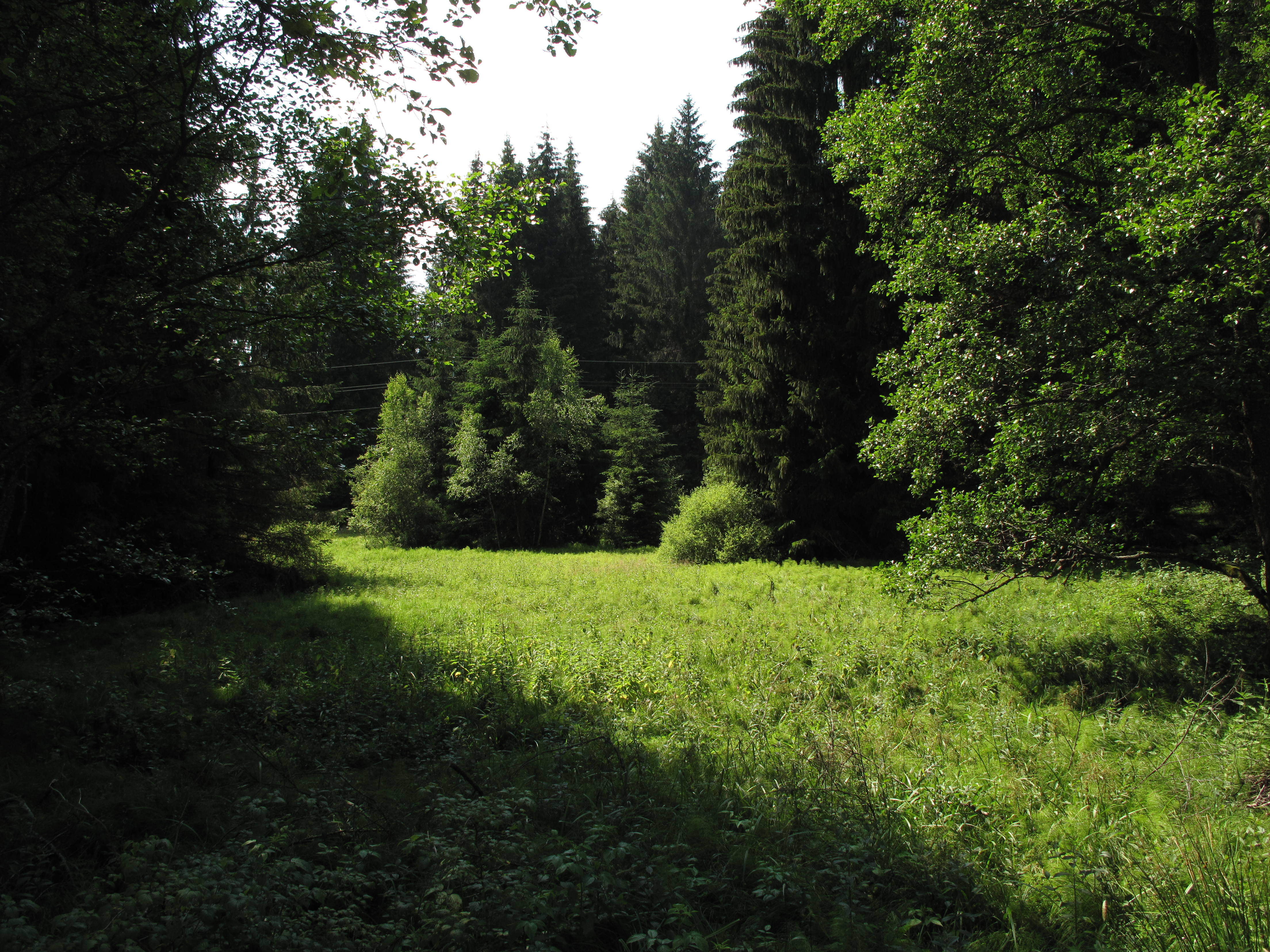 Přírodní památka Spáleniště. Okres Český Krumlov, Česká republika.